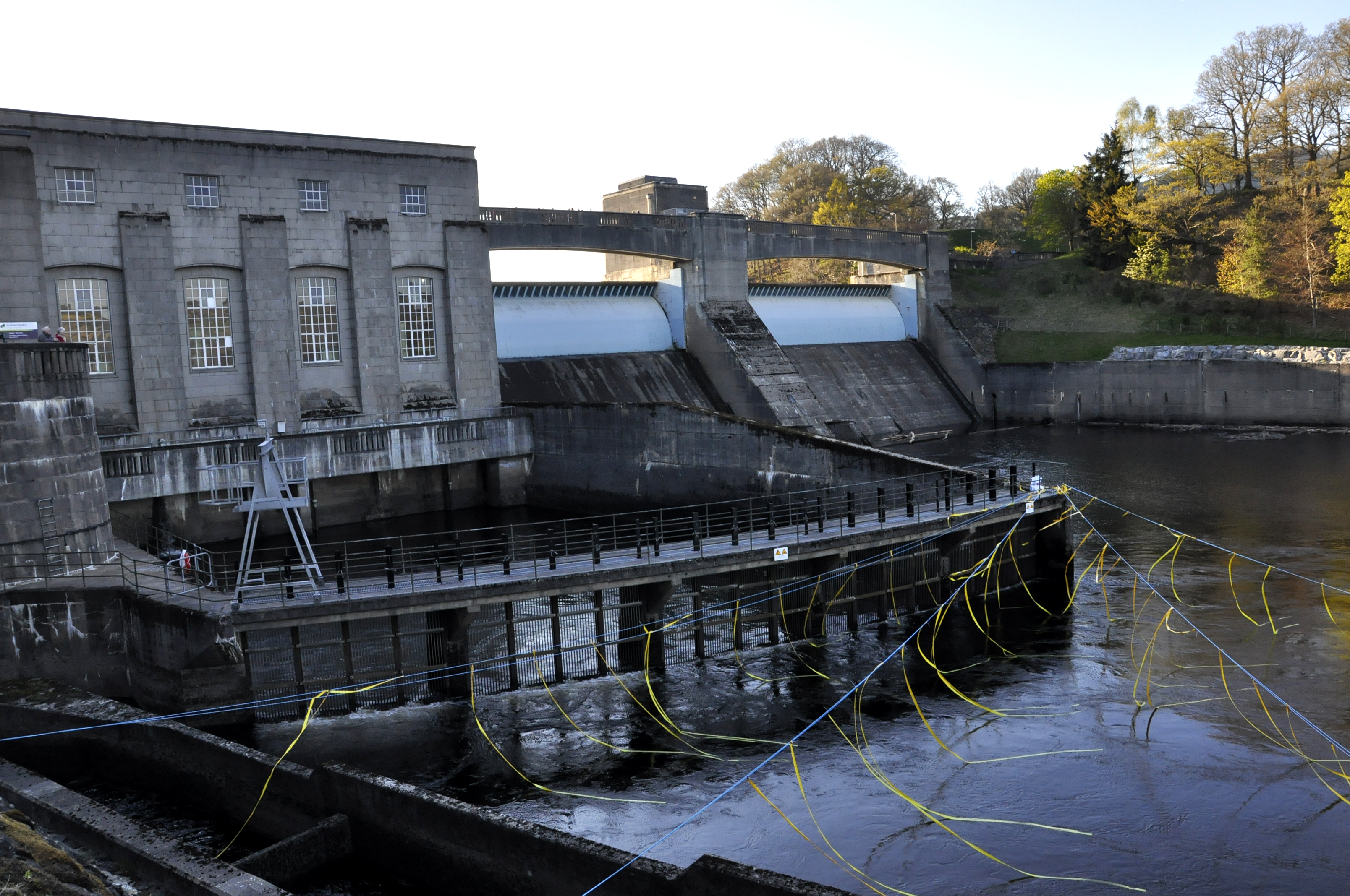 De waterkrachtcentrale van Pitlochry, Schotland